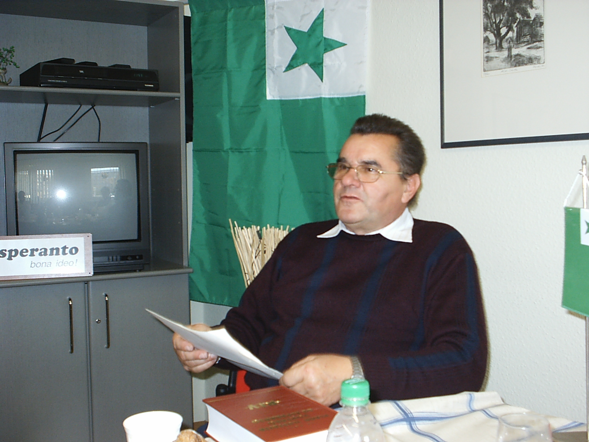 Werner Pfennig dum Semajnfina Esperanto-Seminario 2007 en Neubrandenburg